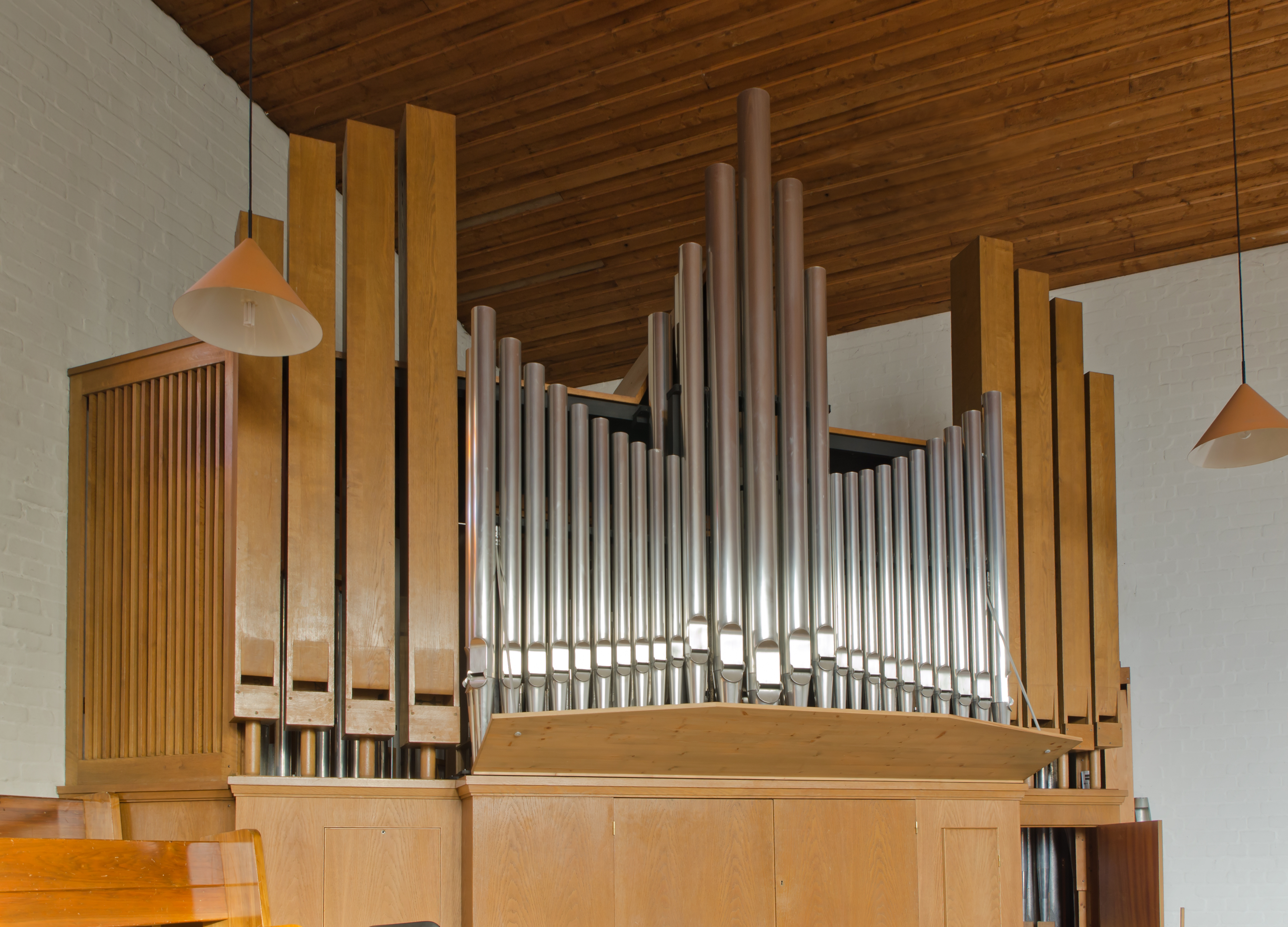 Orgel der St.Stephan-Kirche in Hamburg-Wandsbek